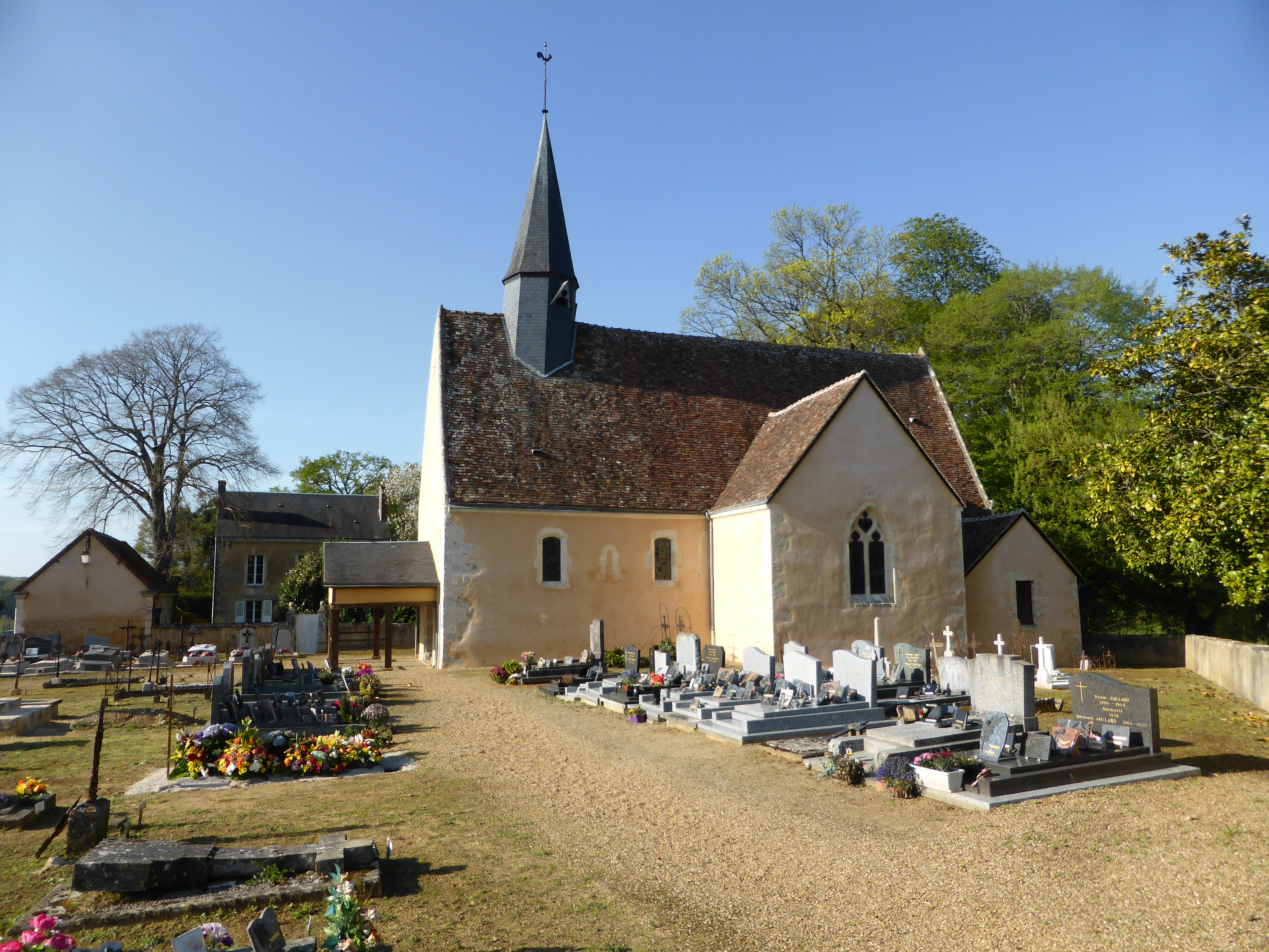 Église et cimetière de Pouvrai, dans l'Orne.